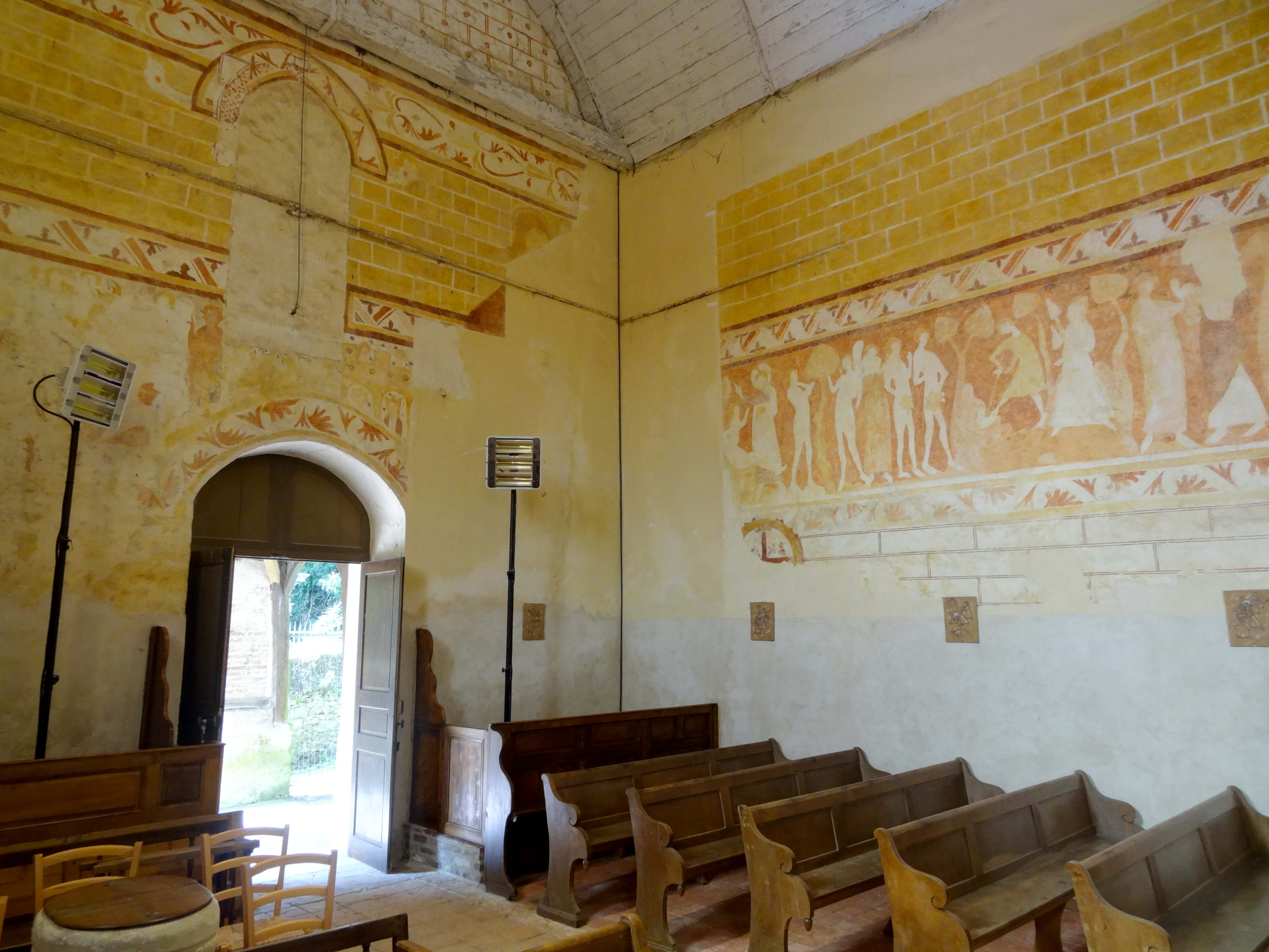 Intérieur de l'église - voir titre.